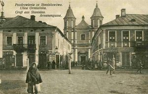 Вірменська церква у Станиславові (Івано-Франківську) на старій поштівці